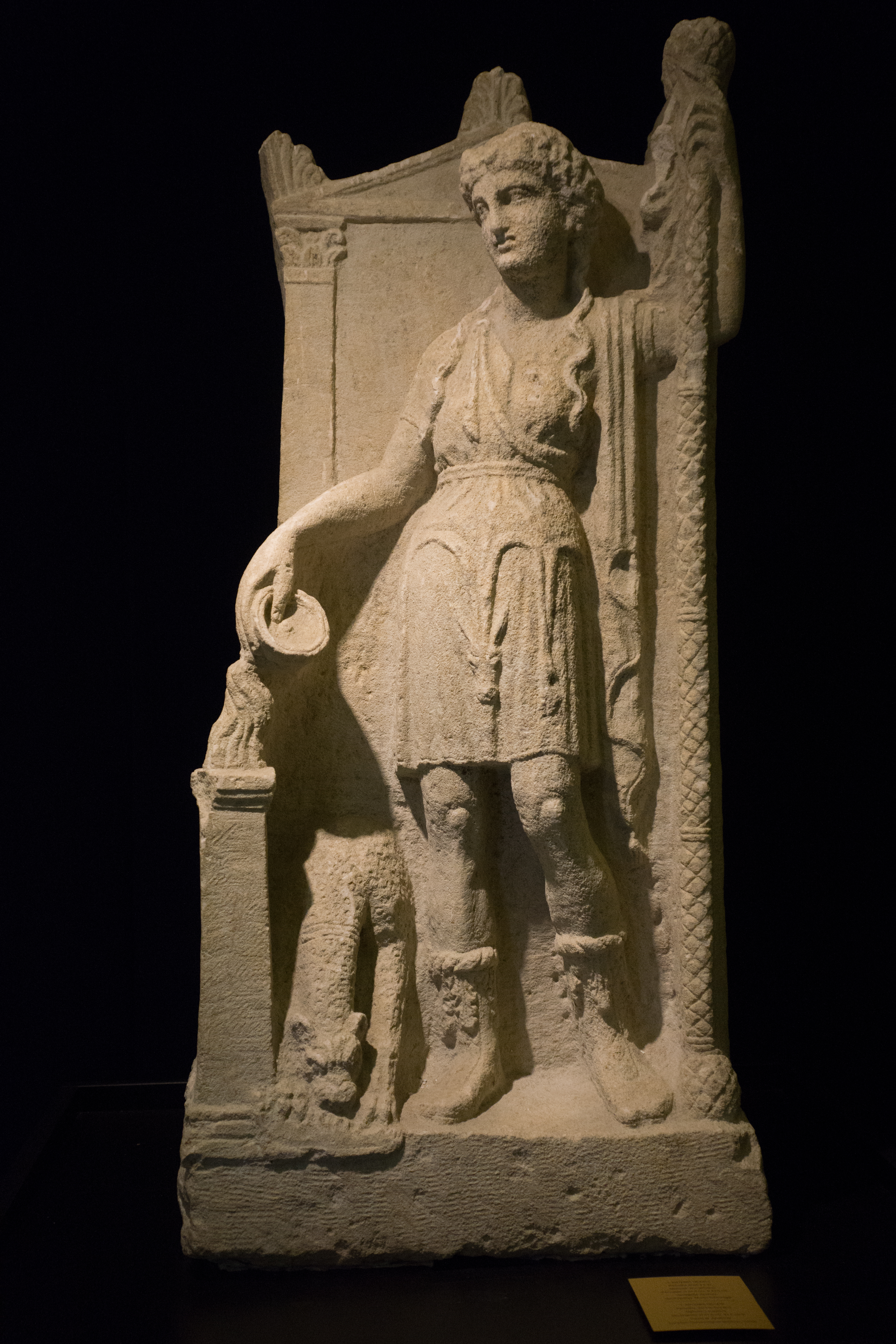 Artemis Hekate, 3e siècle av. J.-C., Apollonia. Grès, 91,5 cm. Musée archéologique de Tirana.